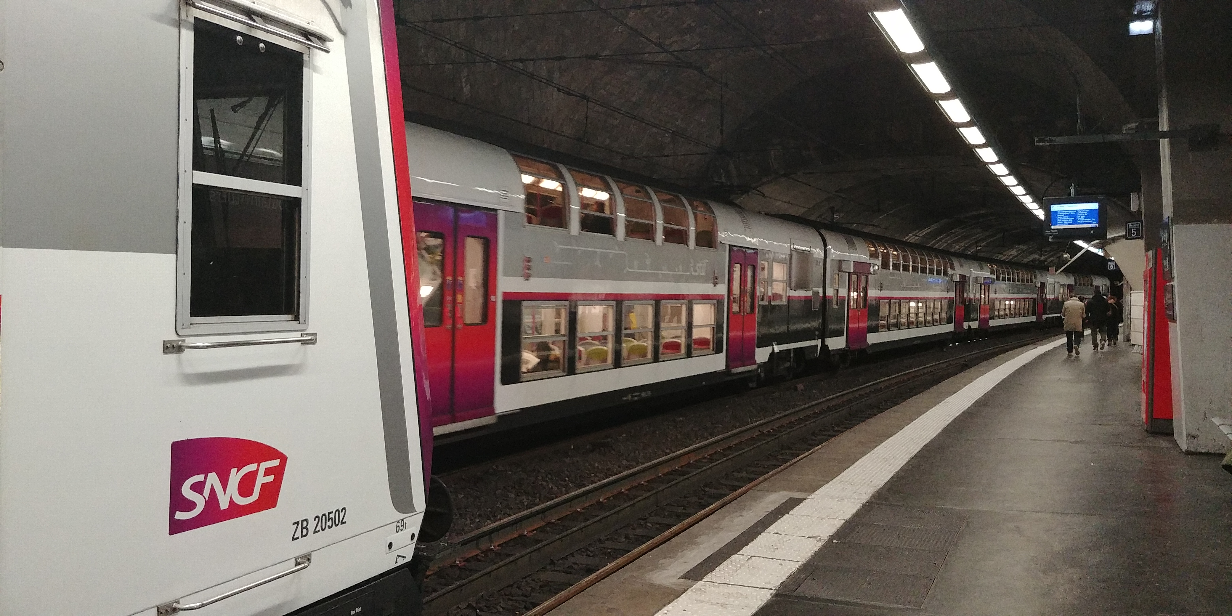 Deux trains du RER C qui se croisent en gare de Boulainvilliers à Paris.